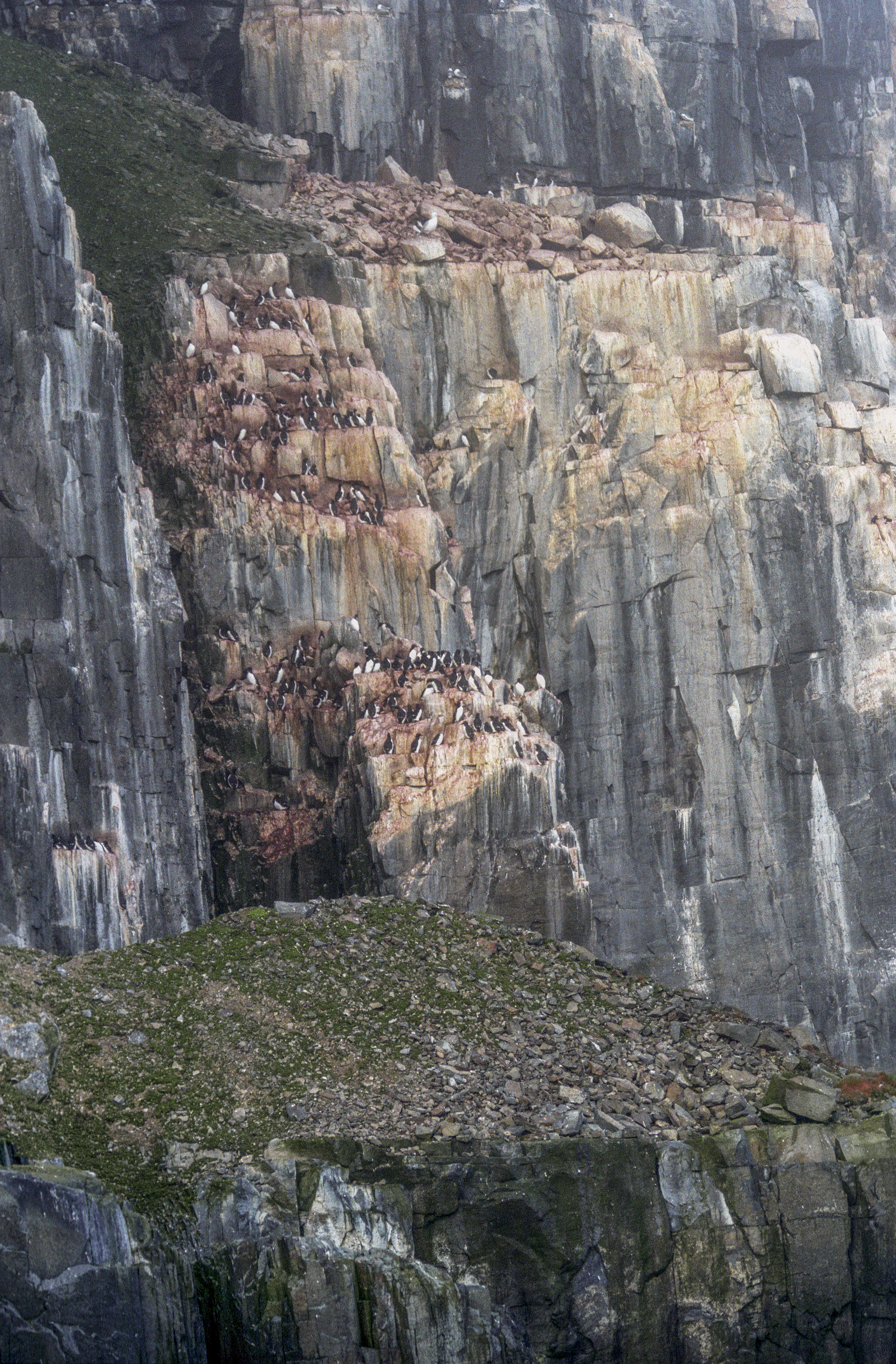 Spitsbergen, Uria lomvia, Alkefjellet, Brunnich's Guillemot